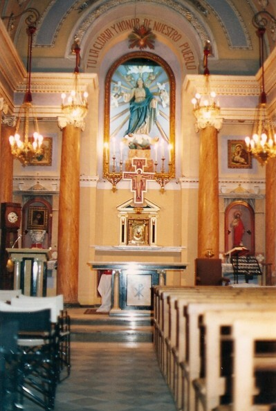 Interior de la iglesia de Segart